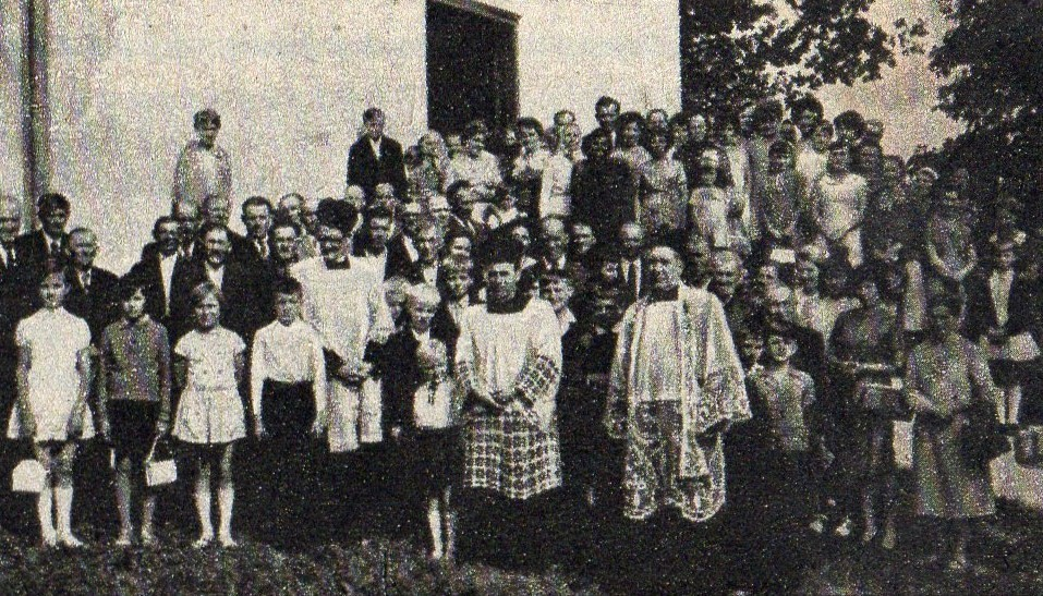 Ks. Józef Sobala wraz ze swoimi polskokatolickimi parafianami w Łękach Dukielskich w 1968r.